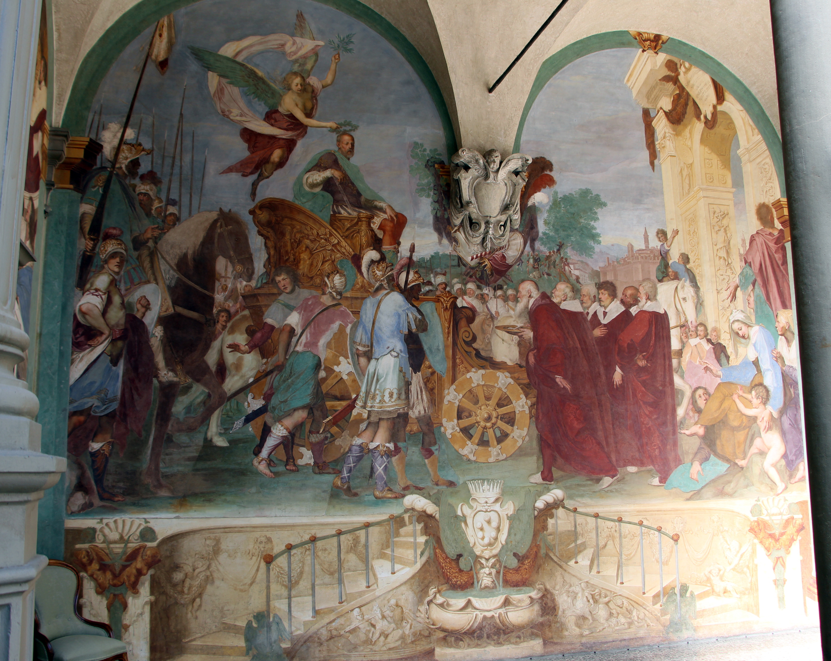 Villa medicea della Petraia - MIBAC The making of this document was supported by Wikimedia CH. (Submit your project!) For all the files concerned, please see the category Supported by Wikimedia CH. This is a photo of a monument which is part of cultural heritage of Italy.